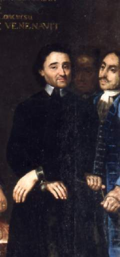 Anónimo - Giuseppe Beccarelli